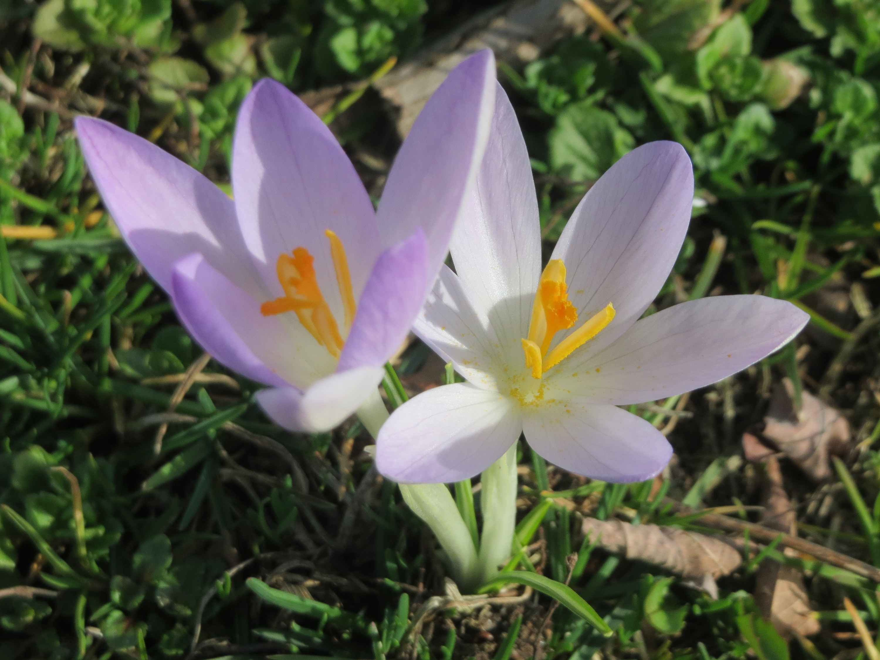 Elfen-Krokus (Crocus tommasinianus) im Gartenschaupark Hockenheim